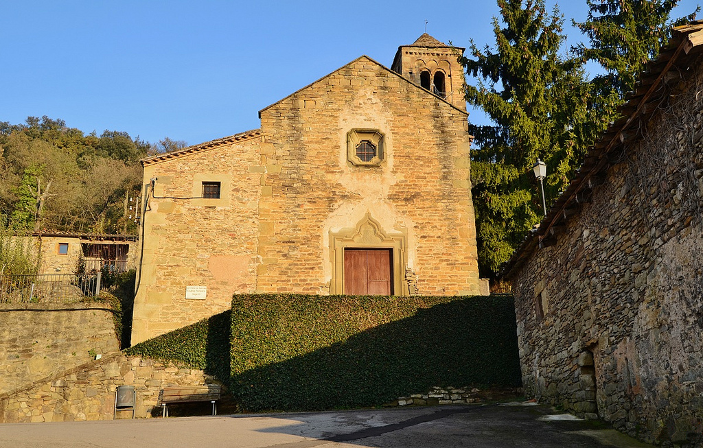 Església de Sant Esteve de Tavèrnoles